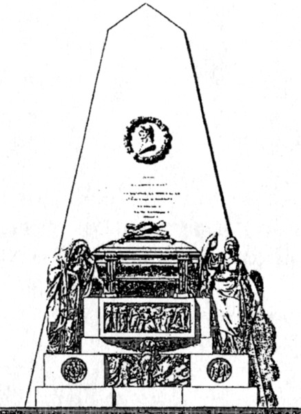 Храм Казанской иконы Божией Матери в селе Ярополец. Проект надгробия графа З.Г. Чернышева. Рисунок А. Триппеля. Около 1787 года.